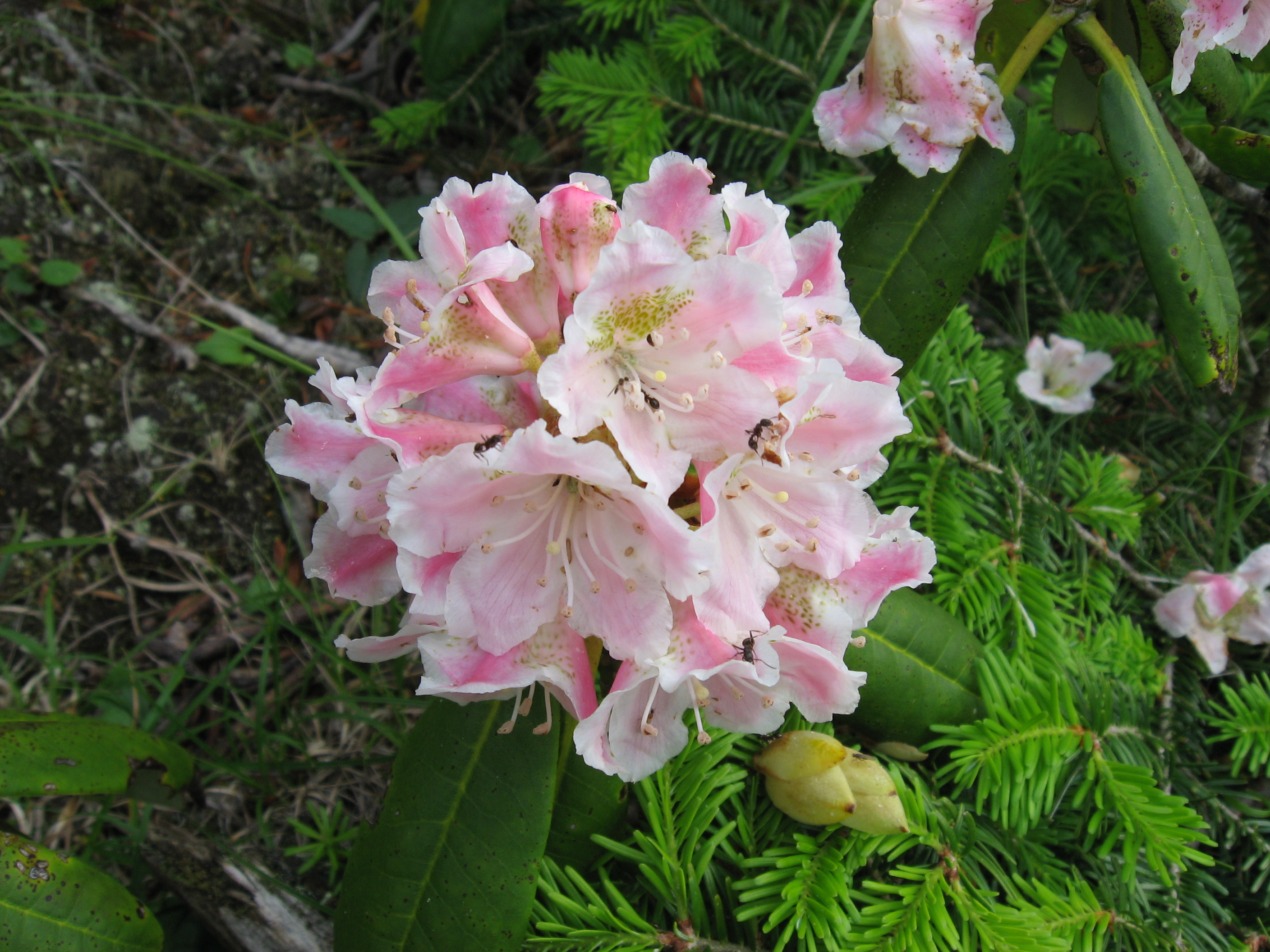 ハクサンシャクナゲ (Rhododendron brachycarpum)